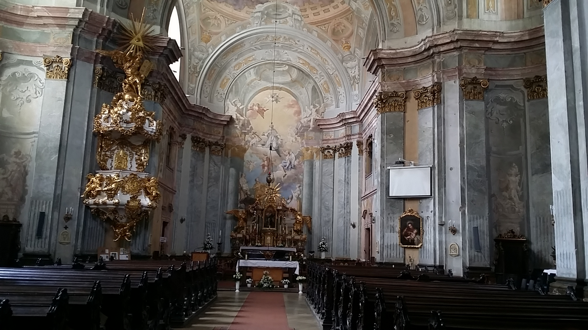 Székesfehérvár Nepomuki Szent János templom